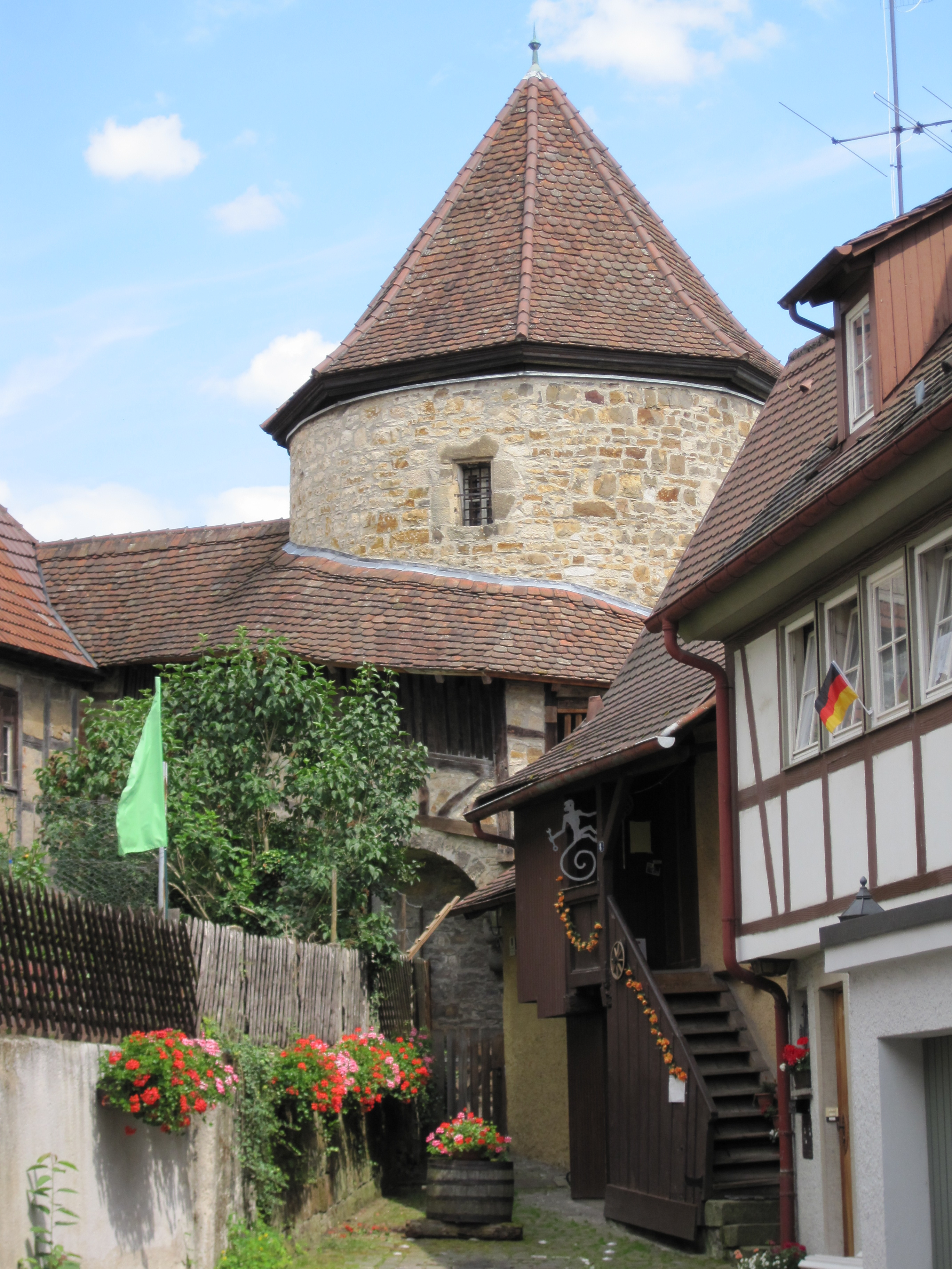 Nürtinger Blockturm. Er sicherte die südöstliche Ecke der 1354 erstmals erwähnten Stadtmauer und beherbergte das Gefängnis. Das dunkle Verlies mit nur einer Deckenöffnung ist heute noch erhalten.